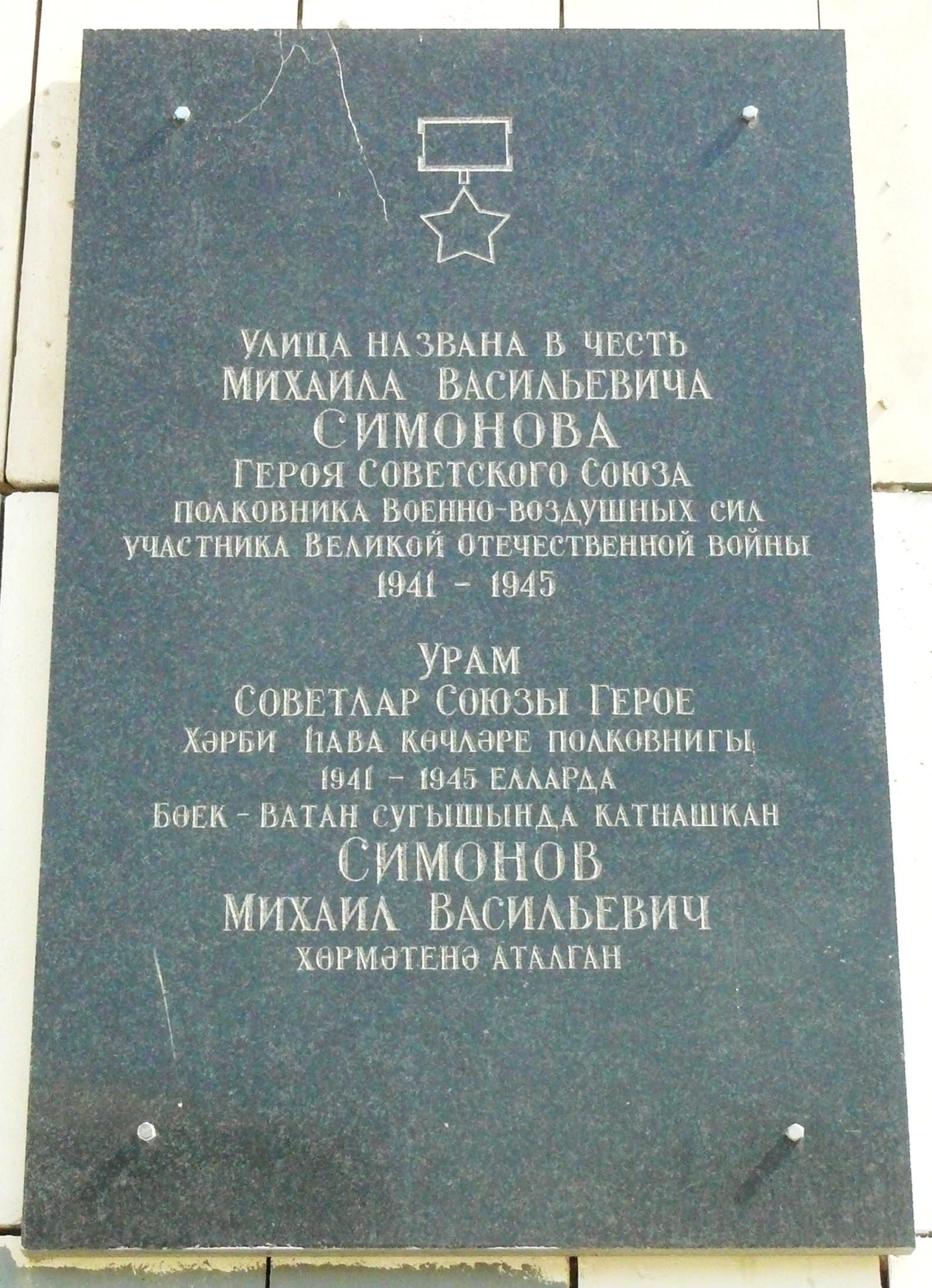 Памятная доска в городе Казани (улица Симонова, дом 6) с надписью на русском и татарском языках: "Улица названа в честь Михаила Васильевича Симонова Героя Советского Союза Полковника Военно-воздушных сил участника Великой Отечественной Войны 1941 - 1945"